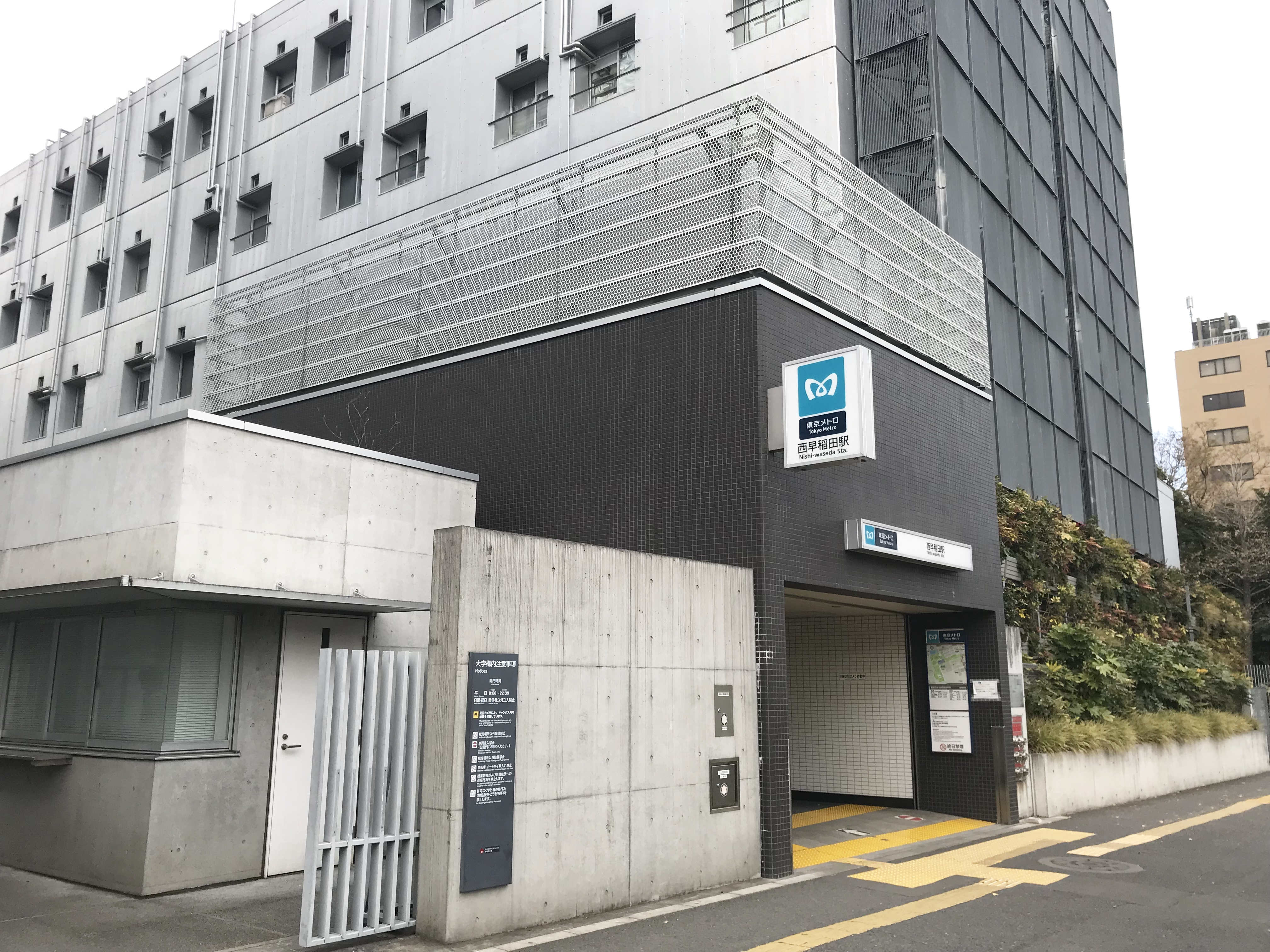 東京メトロ副都心線西早稲田駅3番出入口